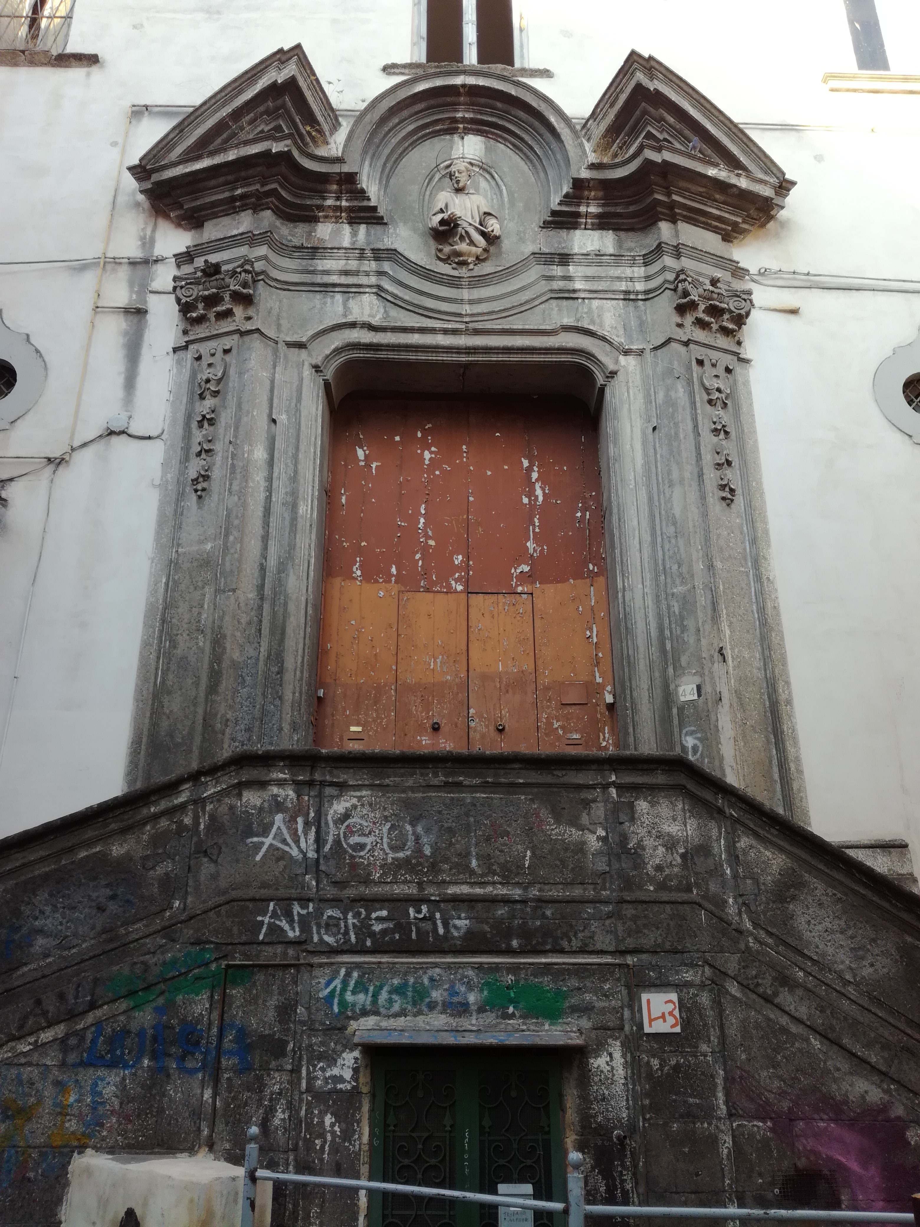 Convento delle Periclitanti